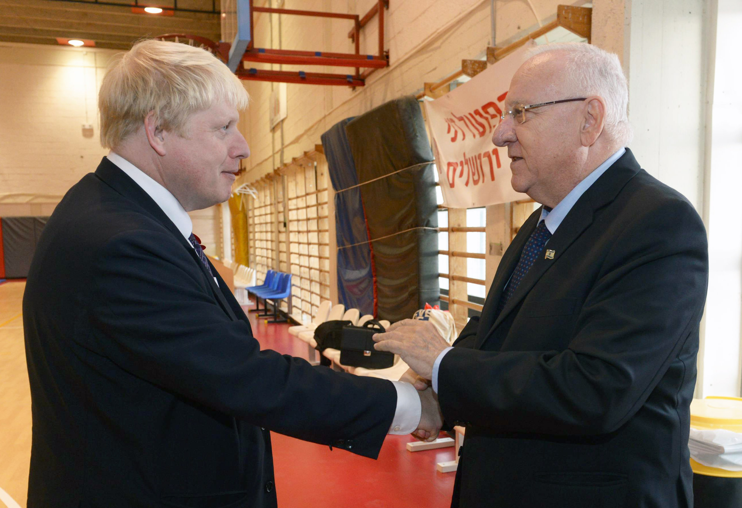 נשיא מדינת ישראל ראובן ריבלין עם ראש עיריית לונדון בוריס ג'ונסון, באירוע פתיחת עונת הכדורגל של עמותת הכדורגל של הילדים "שער שוויון"